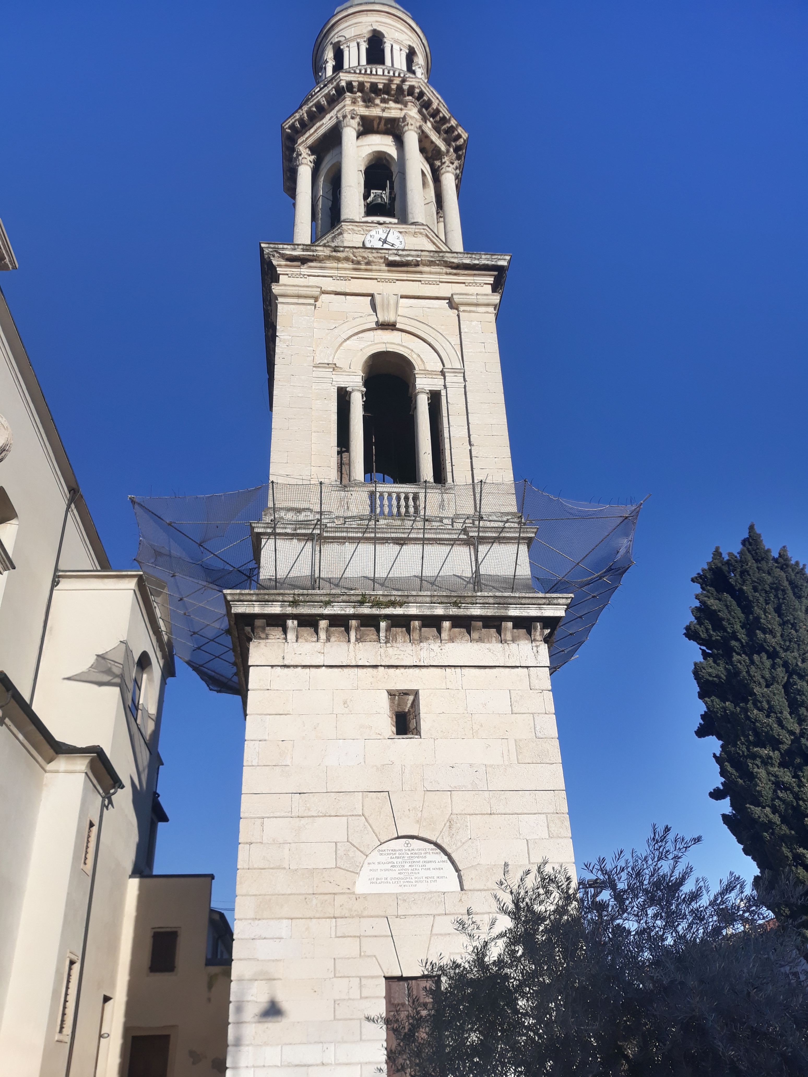 Campanile chiesa san Michele Extra VR